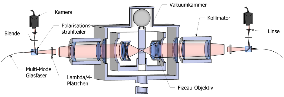 Skizze des Kugelinterferometers der Physikalisch-Technischen Bundesanstalt